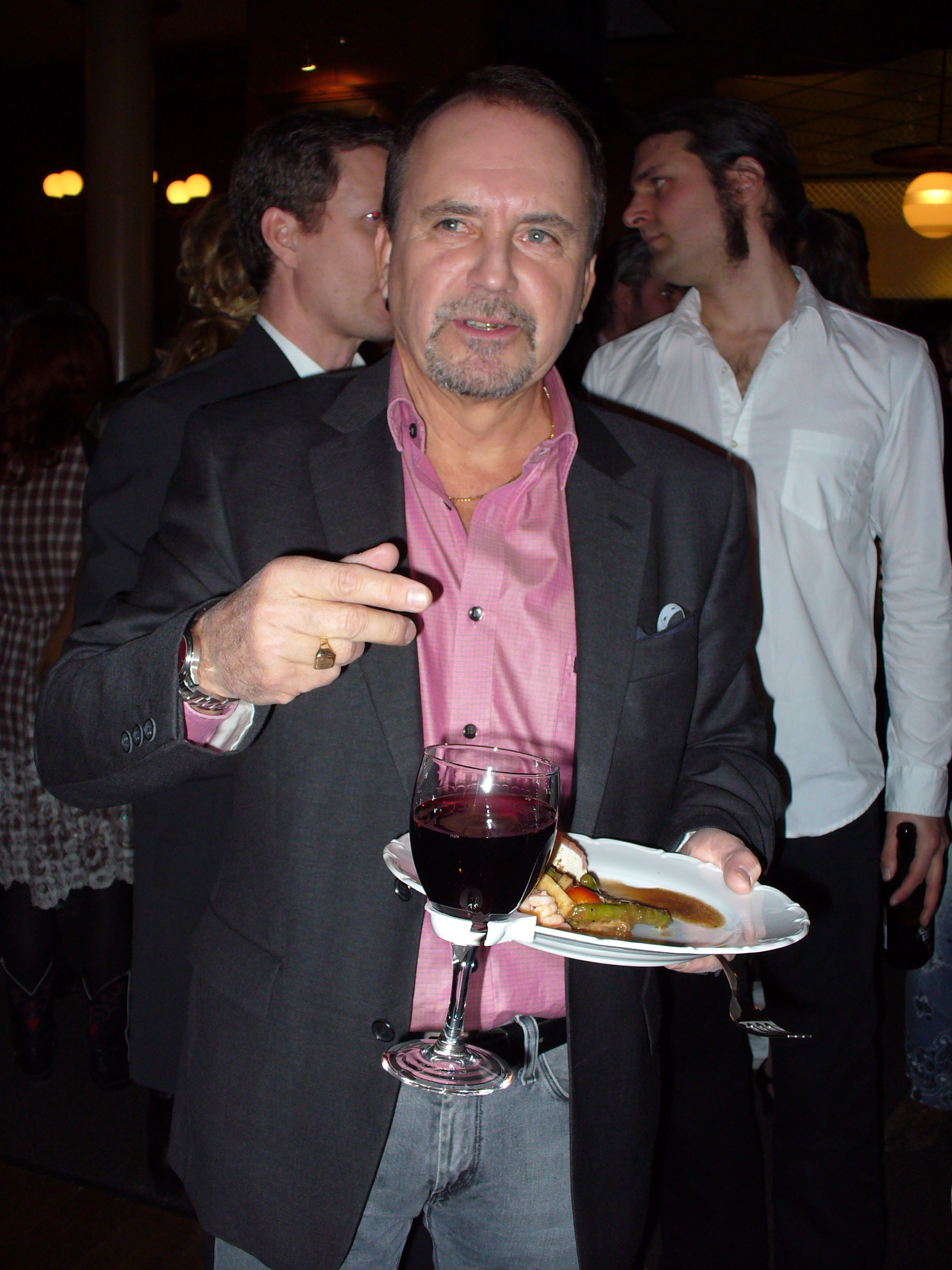 Peter "Peppe" Eng at Aftonbladet TV Awards